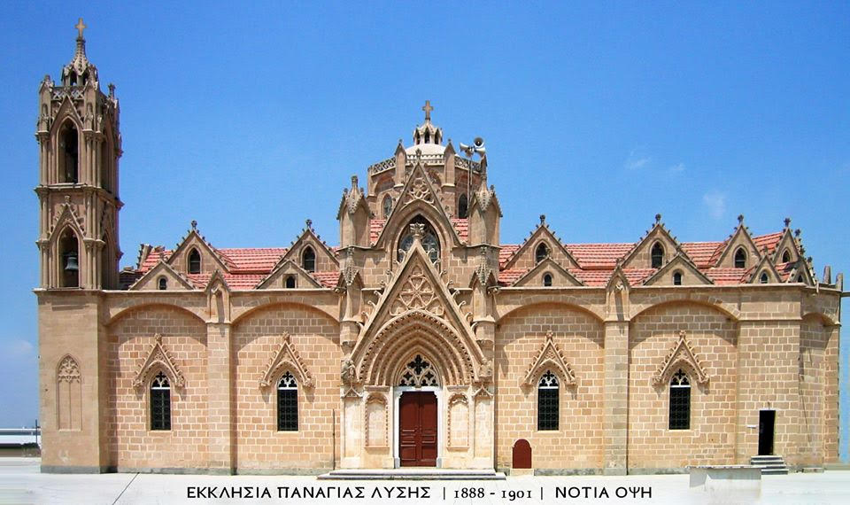 Ekklisia idalion